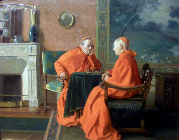 Kardinäle spielen Schach